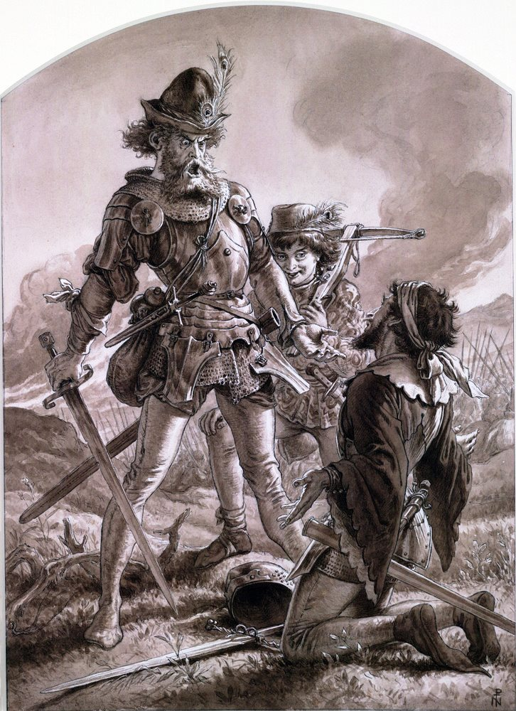 Flullen intimidating Pistol